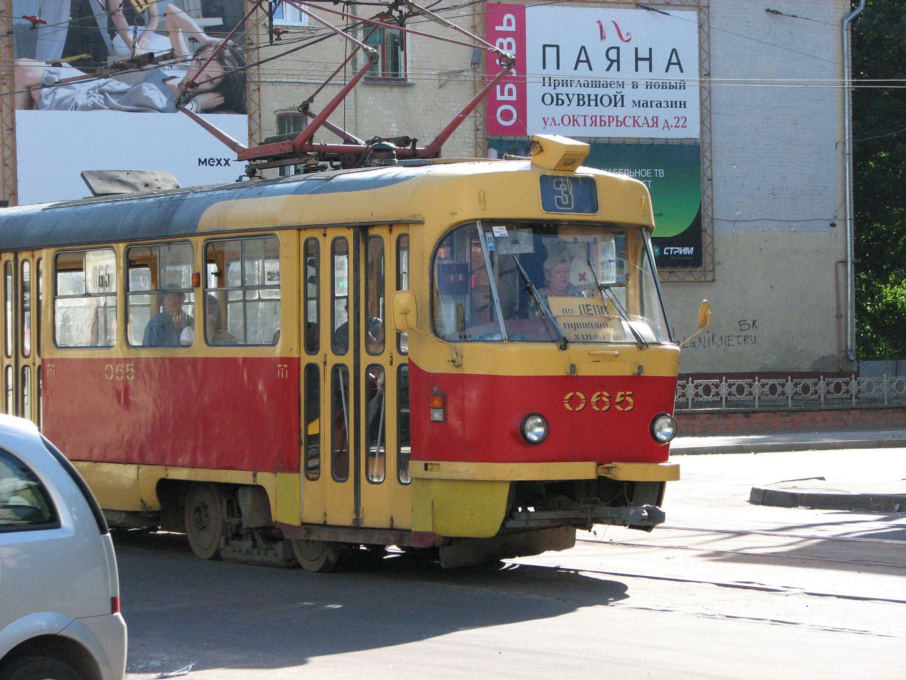 Трамвай в Орле